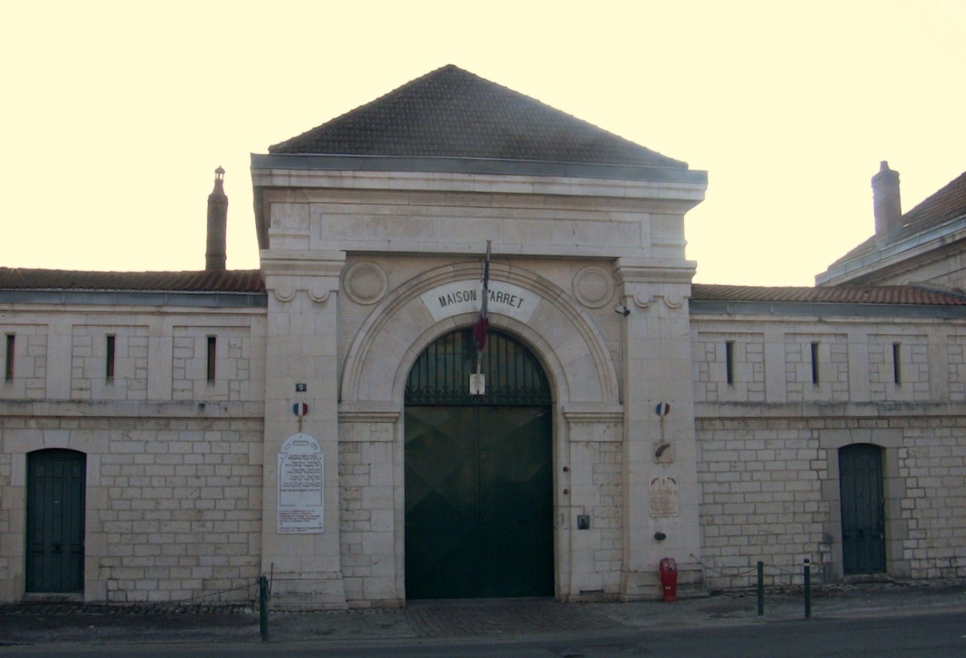 La maison d’arrêt de Besançon (Doubs, France).